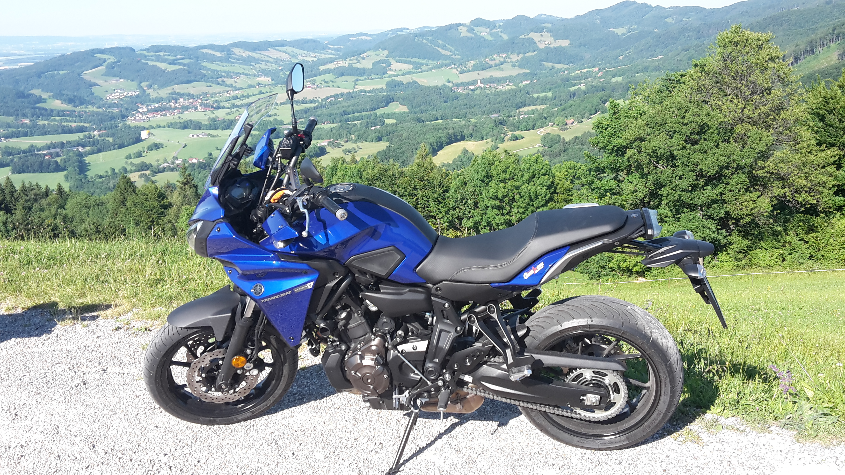 Yamaha 700 Tracer